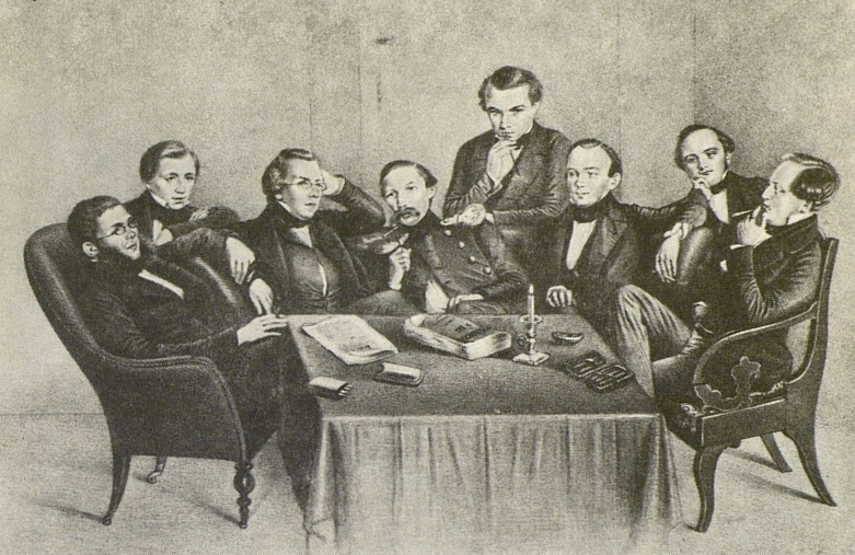 И.С. Аксаков в группе лиц, участвовавших в исследовании раскольничьей секты бегунов (крайний слева на диване, облокотившийся на спинку). Гравюра на дереве с рисунка А.В. Попова. ИРЛИ. Санкт-Петербург